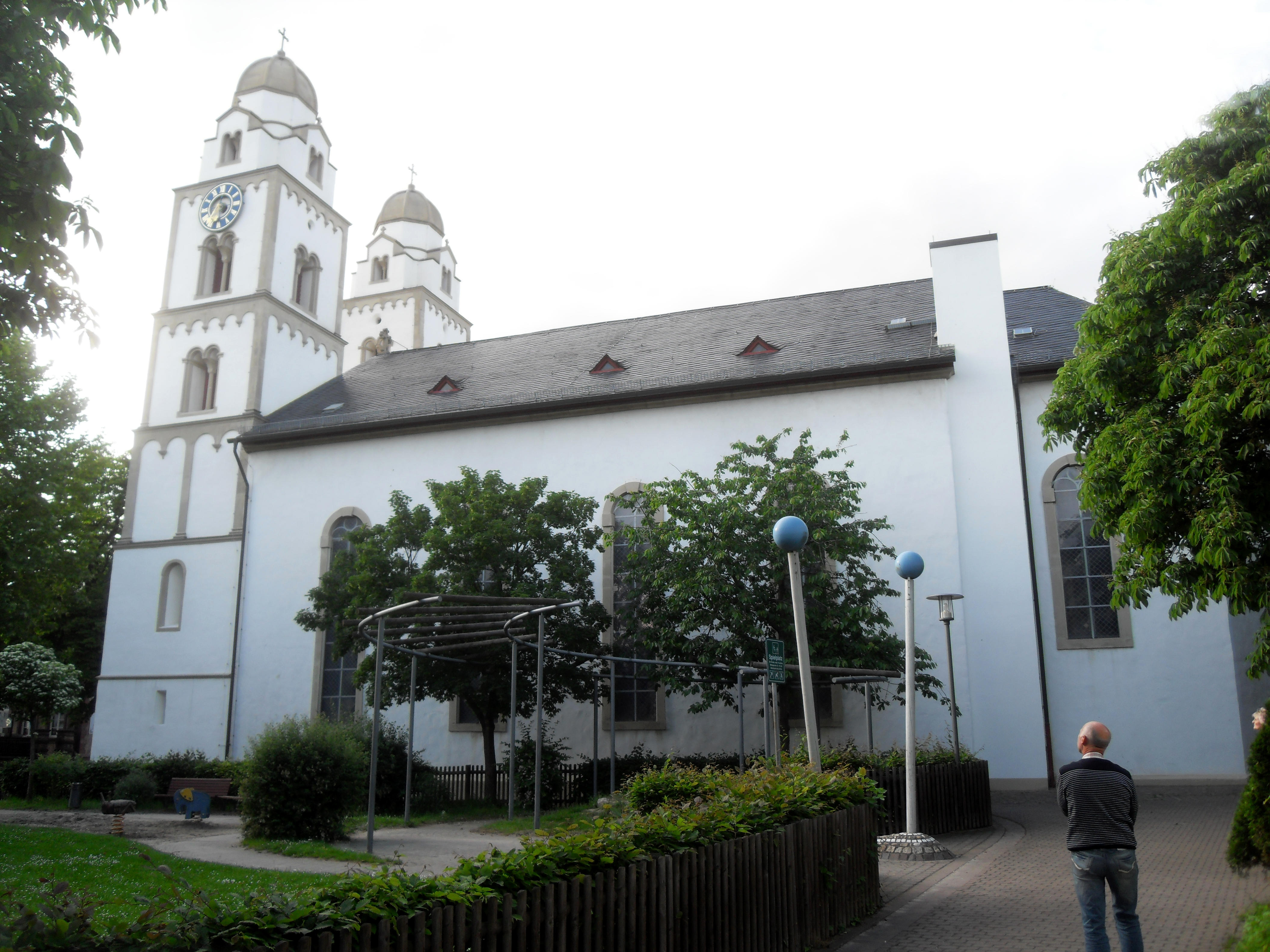 Die Guntersblumer evangelische Kirche in Rheinhessen in Rheinland-Pfalz (Deutschland) von der Kirchstraße (Südseite) aus